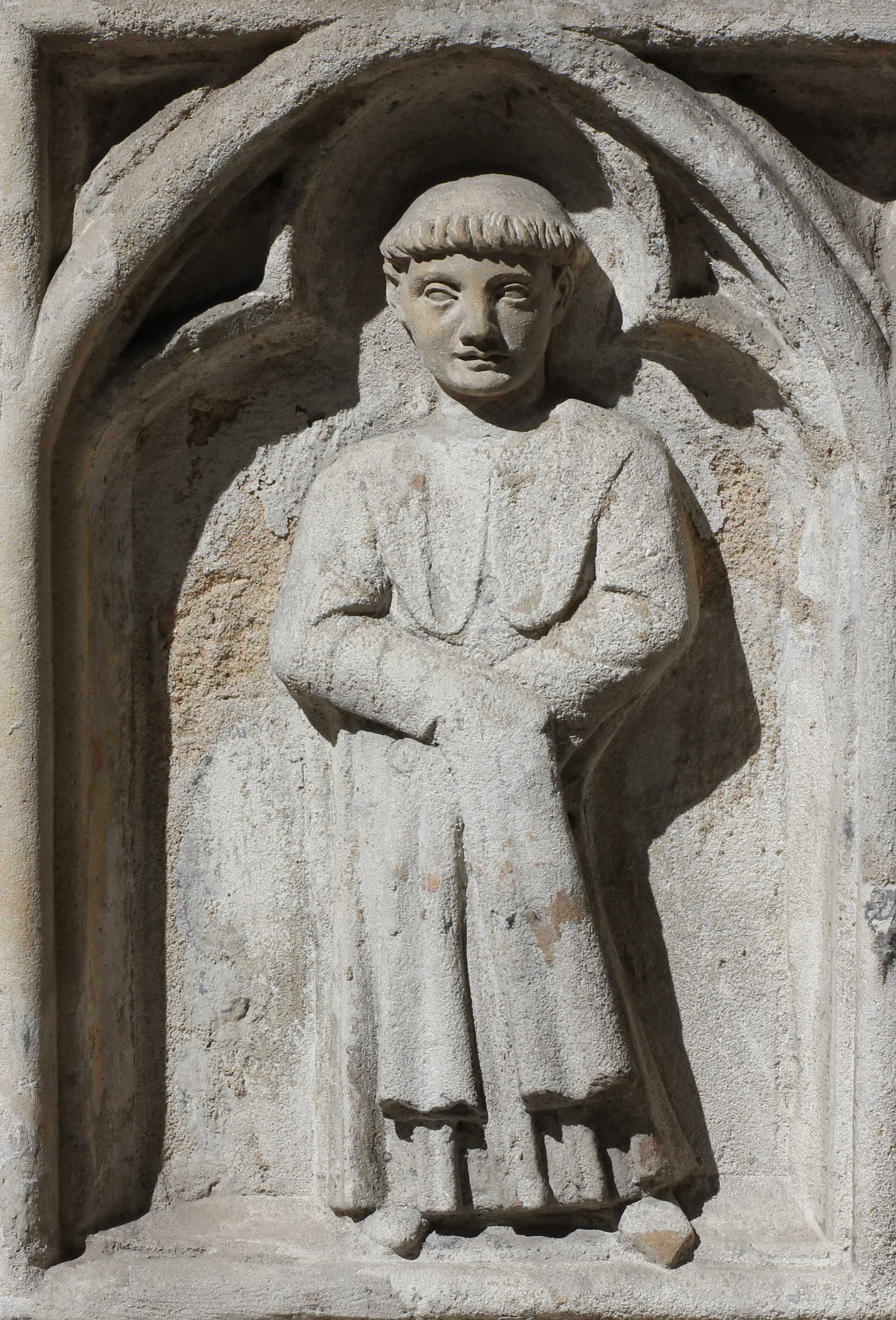 Tombeau de Pierre Abélard (1079-1142) et Héloïse d'Argenteuil (1101–1164) réalisé par Lenoir à partir de fragments de la chapelle de l'abbaye du Paraclet et du tombeau du prieuré Saint-Marcel. La chapelle sépulcrale est ornée de colonnes, d'ogives et d'un clocher percé à jour. Sur le catafalque reposent deux gisants représentant Héloïse et Abélard.